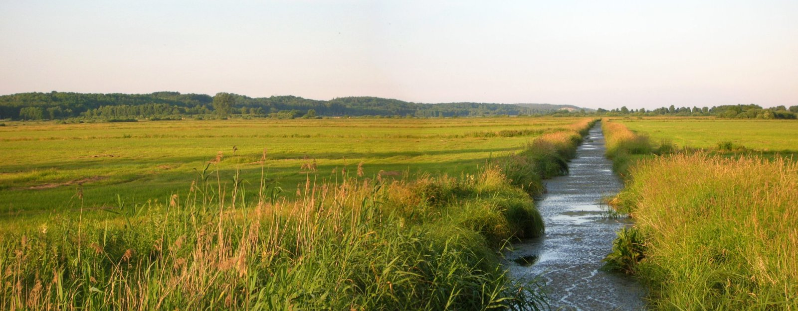 Dolina Środkowej Noteci i Kanału Bydgoskiego